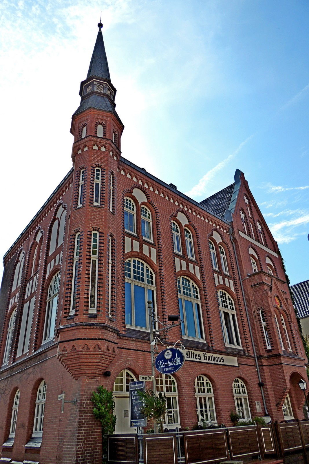 Diepholz: Altes Rathaus mit Körstube